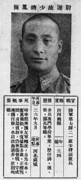 中文（台灣）: 抗戰軍人忠烈錄第一輯中的烈士遺像